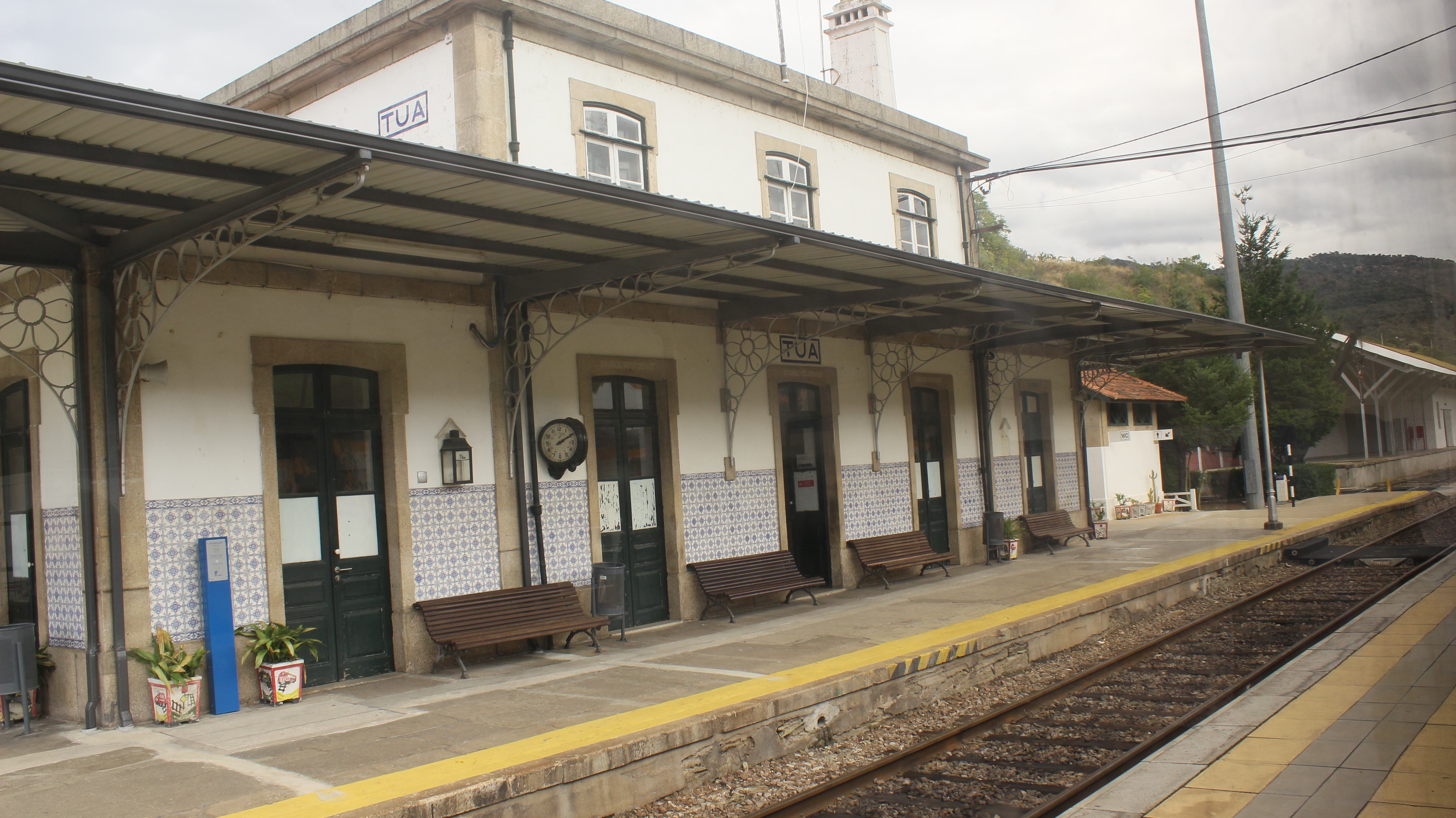 São Mamede de Ribatua